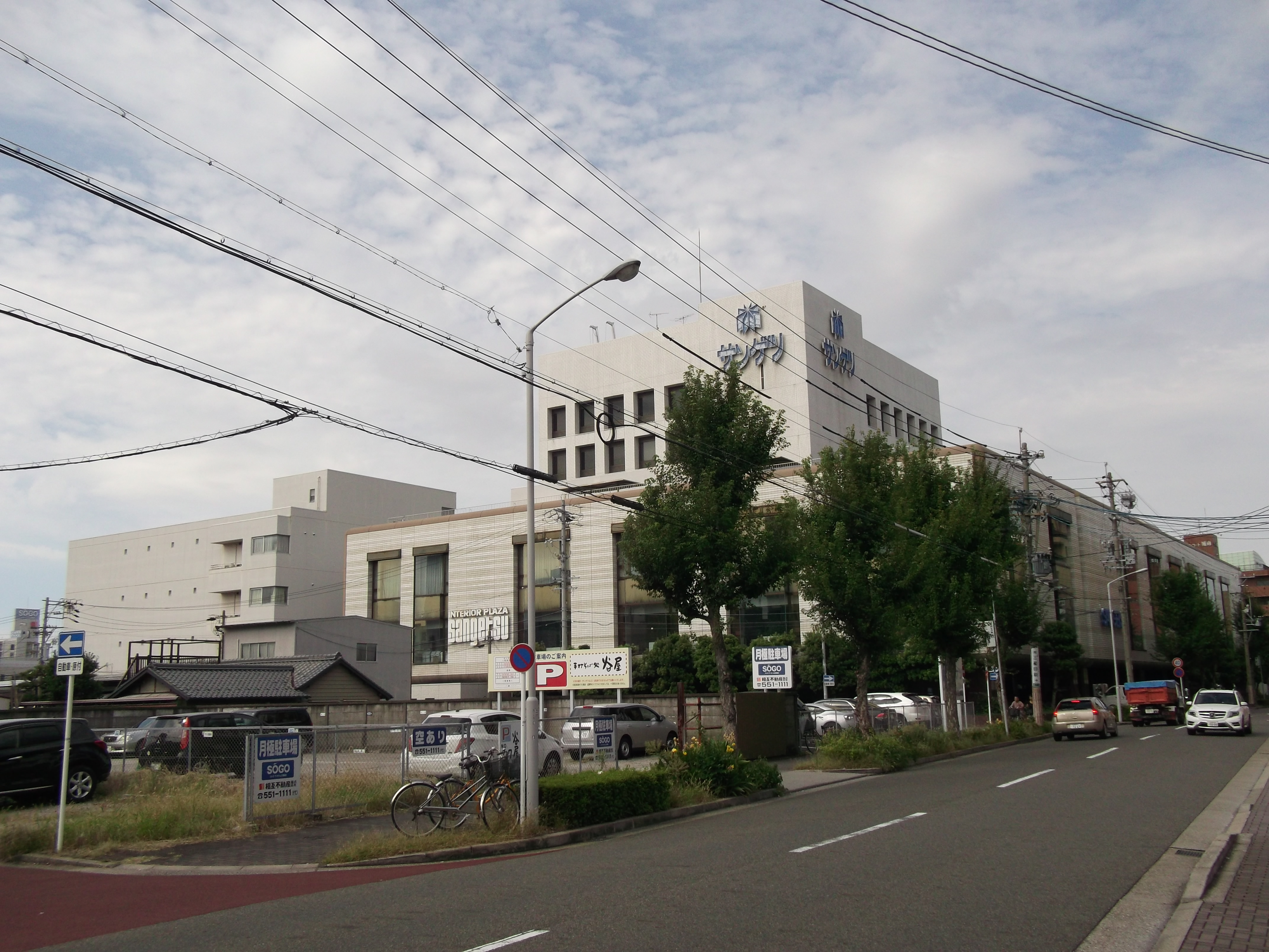 名古屋市西区幅下のサンゲツ本社を東側公道南側より撮影